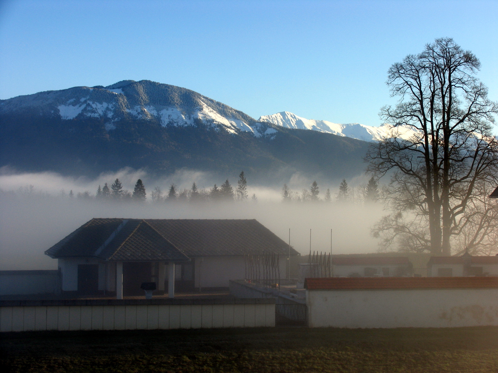 Dobrča z Dobrave